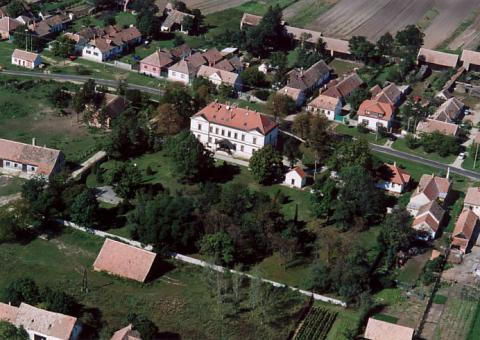 Pusztacsalád, Hungary, aerialphotography